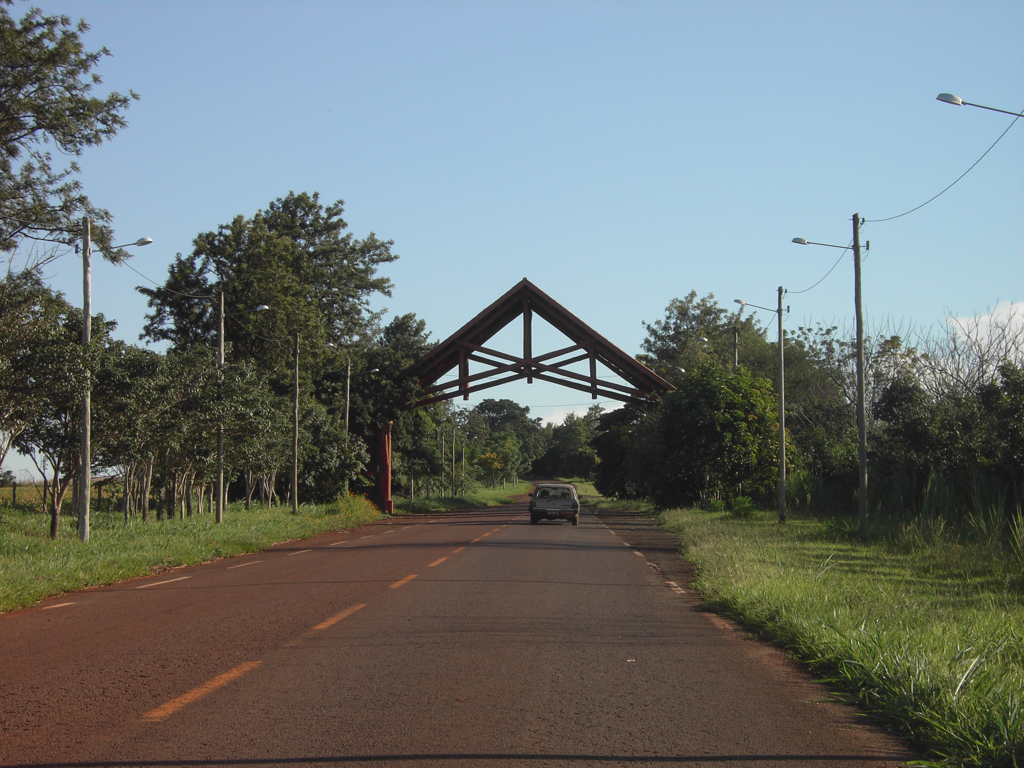 Mata do Godoy, Londrina-PR, Brasil